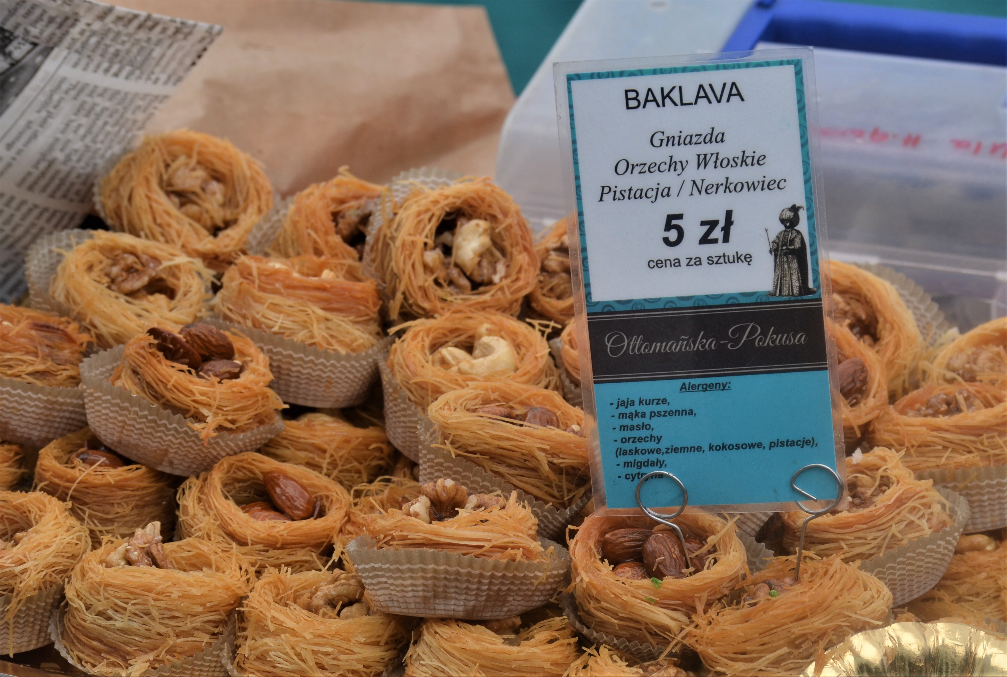 Türkische Küche in Schlesien